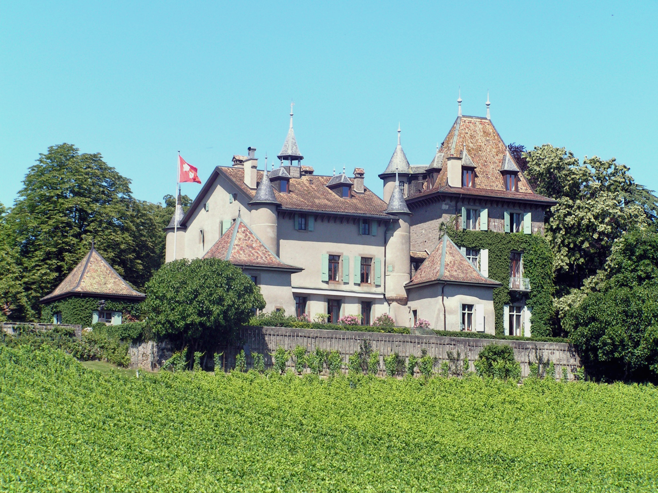 Château du Crest